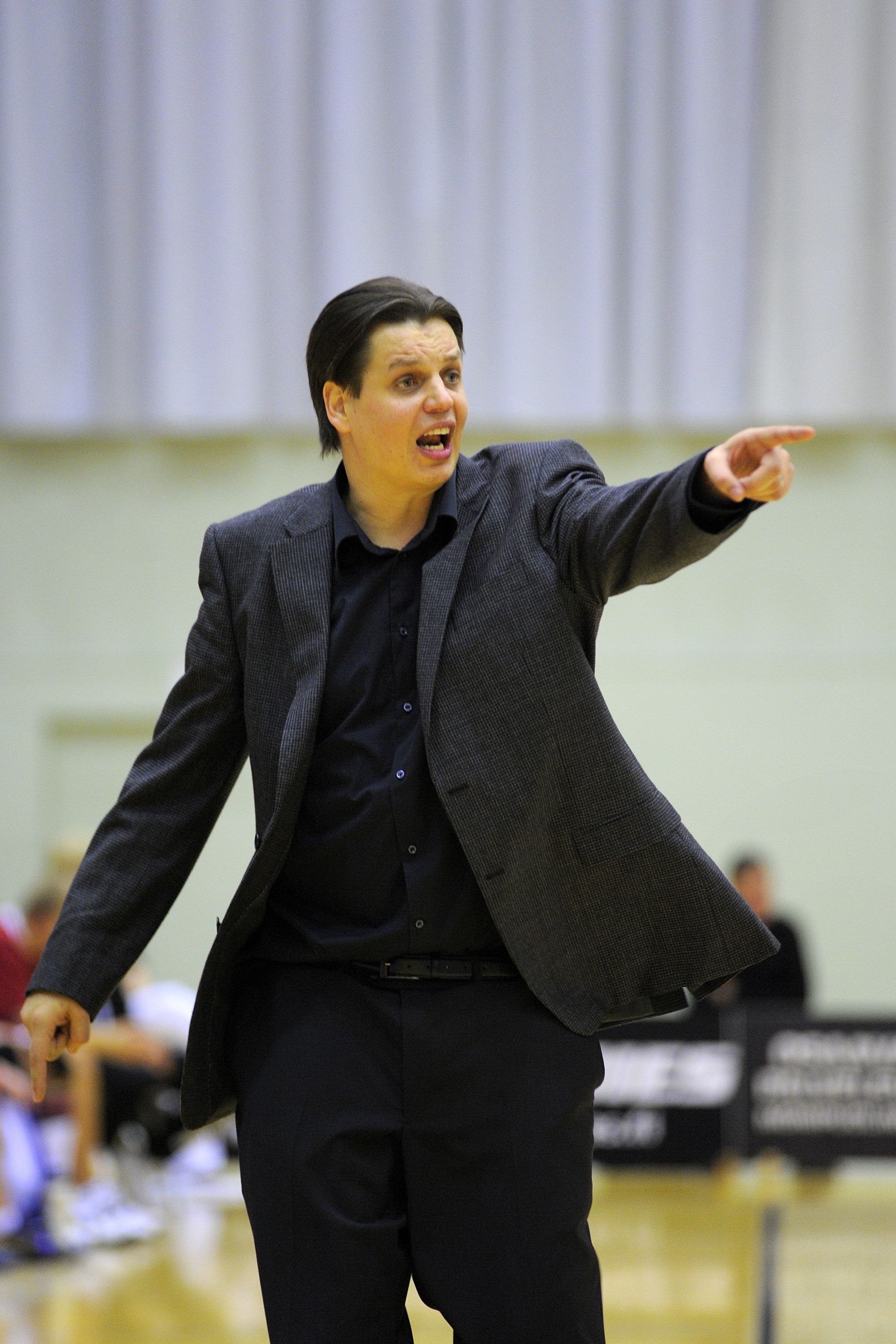 Koripallovalmentaja Jyri Lehtonen 11.17.2010 ottelussa Lappeenrannan NMKY - Kouvot.